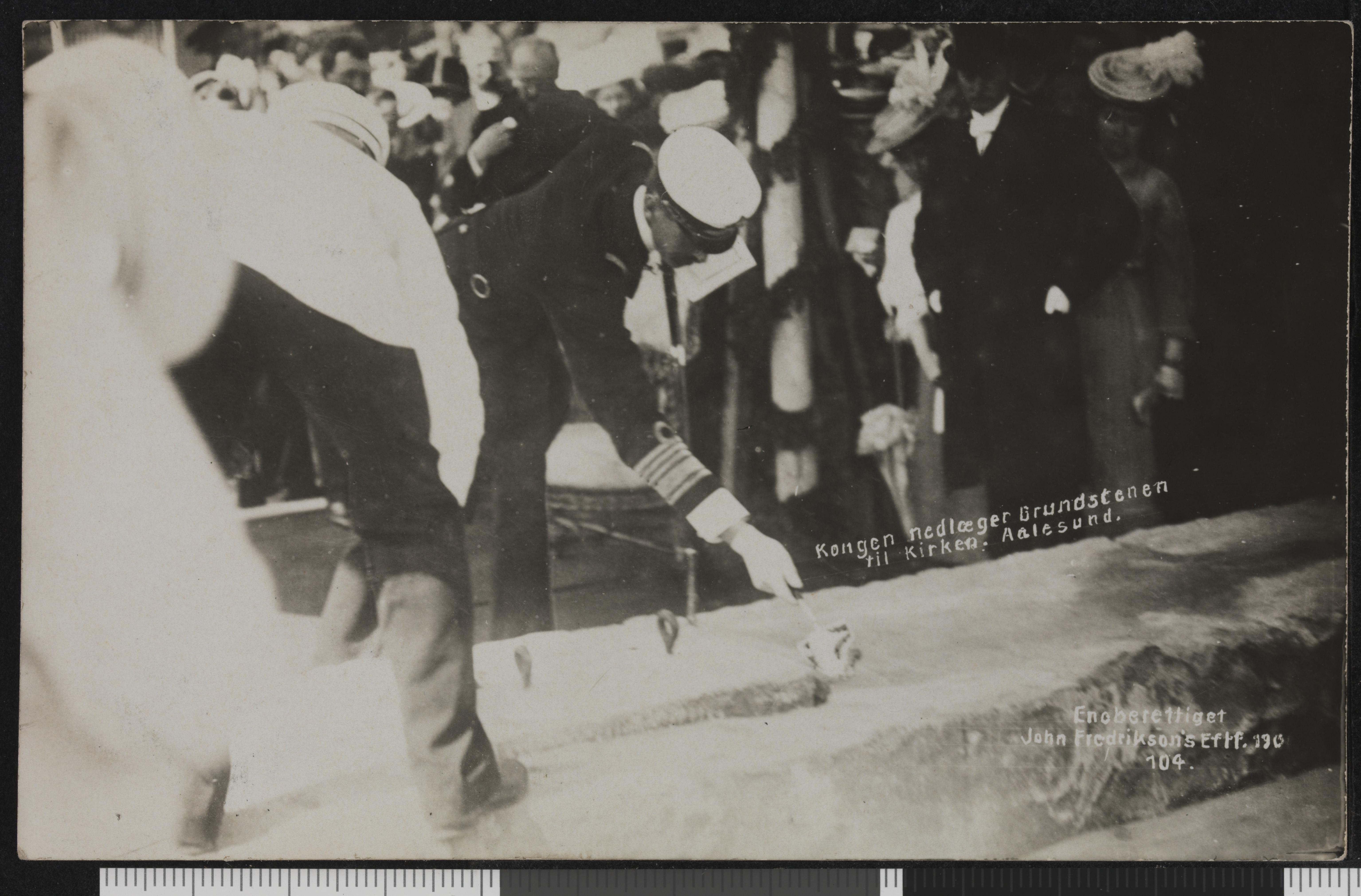 Bildet er hentet fra Nasjonalbibliotekets bildesamling Ålesund, Møre og Romsdal Depicted person: Haakon VII konge av Norge